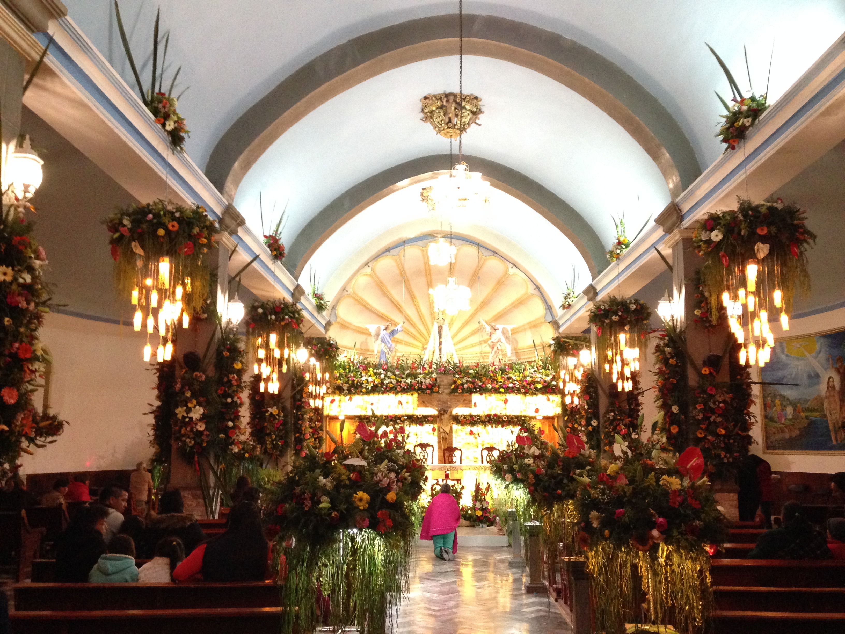 Interior Templo